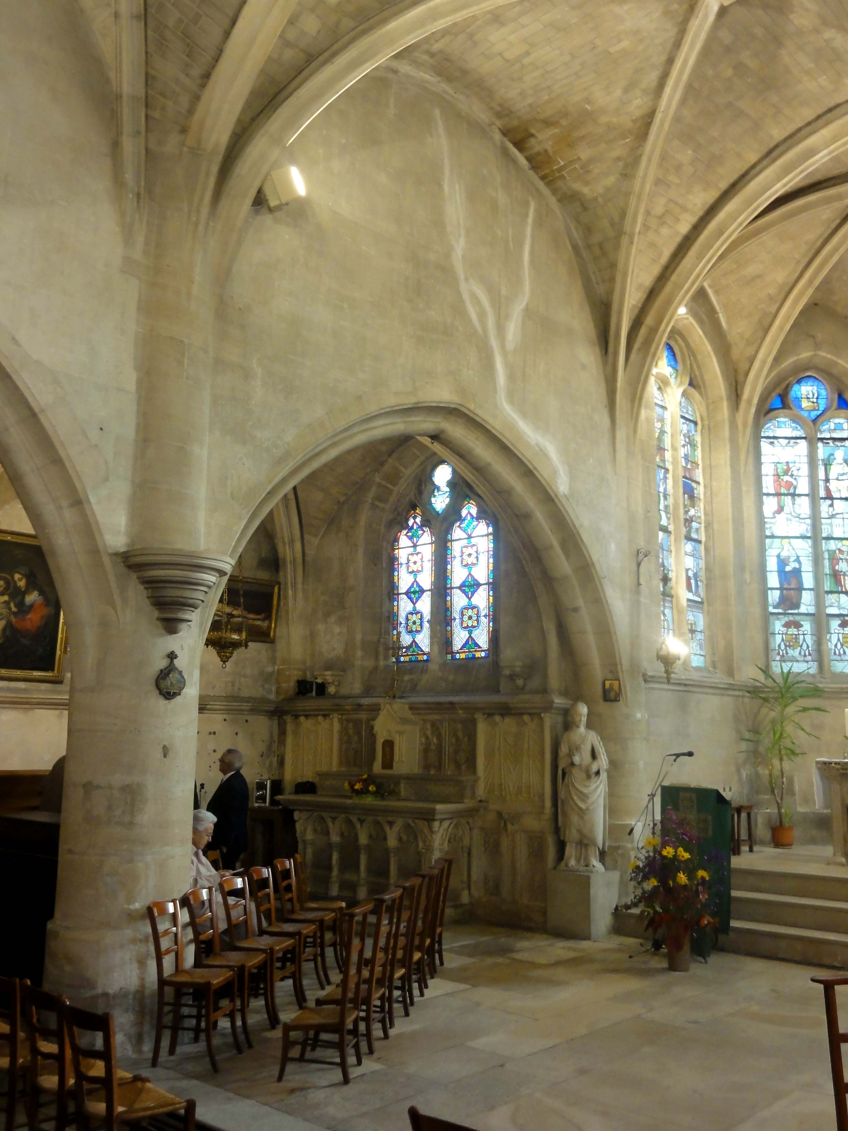 Intérieur de l'église - voir titre.